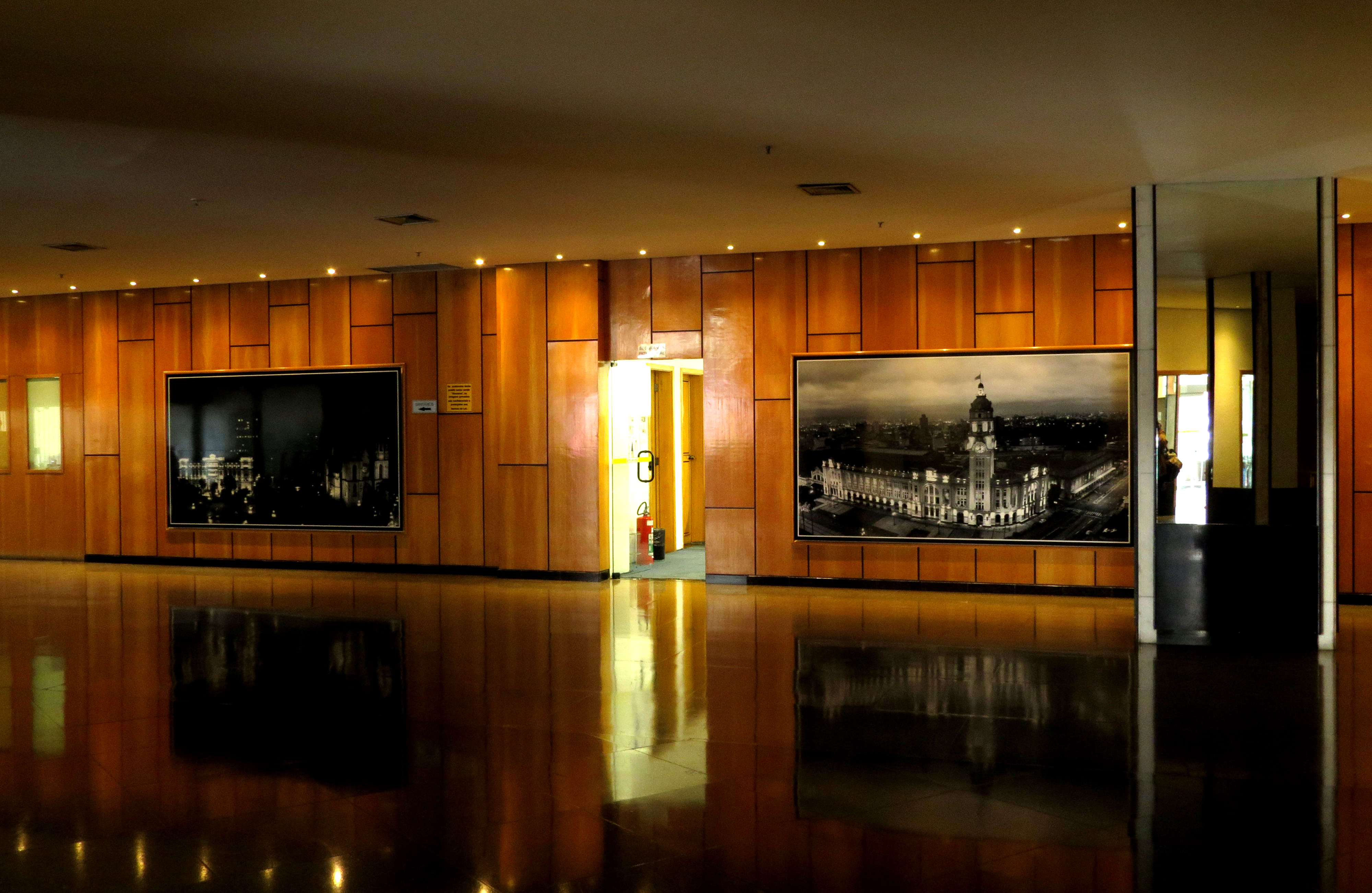 Entrada da recepção do edifício do Tribunal de Justiça de São Paulo e quadros decorativos.